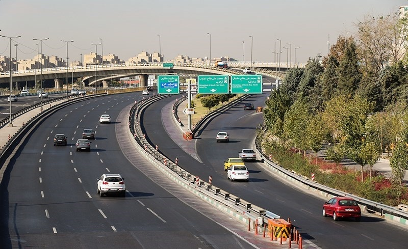 یک ترافیک روان در تهران؛ تصویر از تسنیم